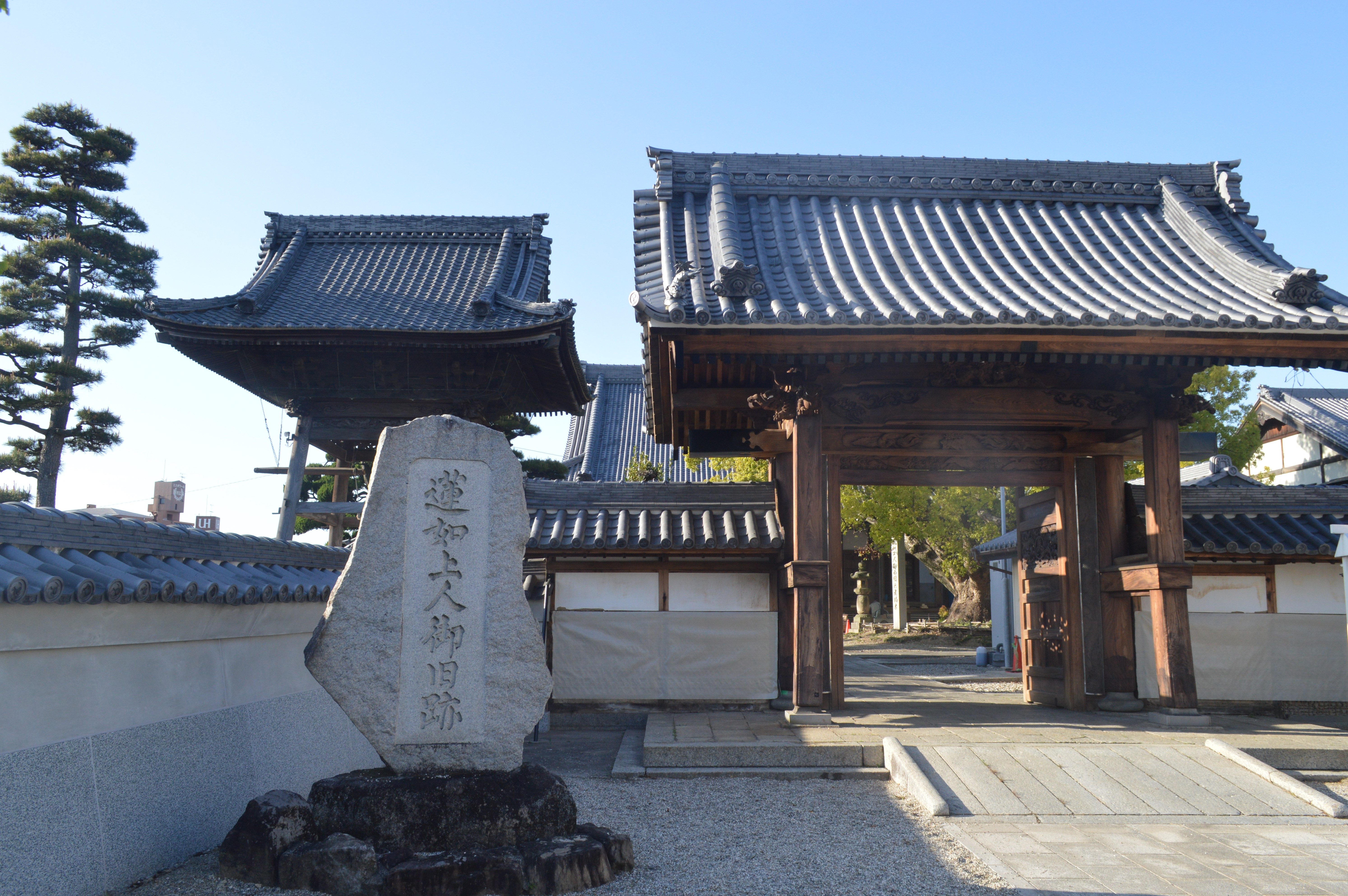 愛知県刈谷市元町1丁目63-1にある専光寺。